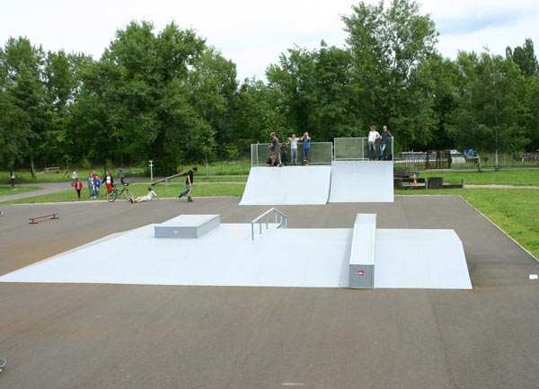 Nový skatepark